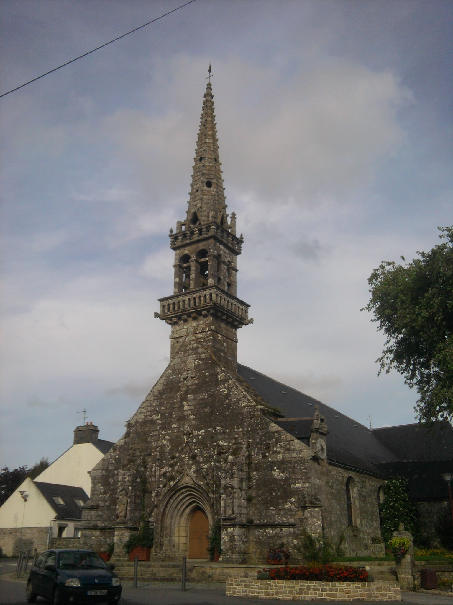 église de Briec, France 2012